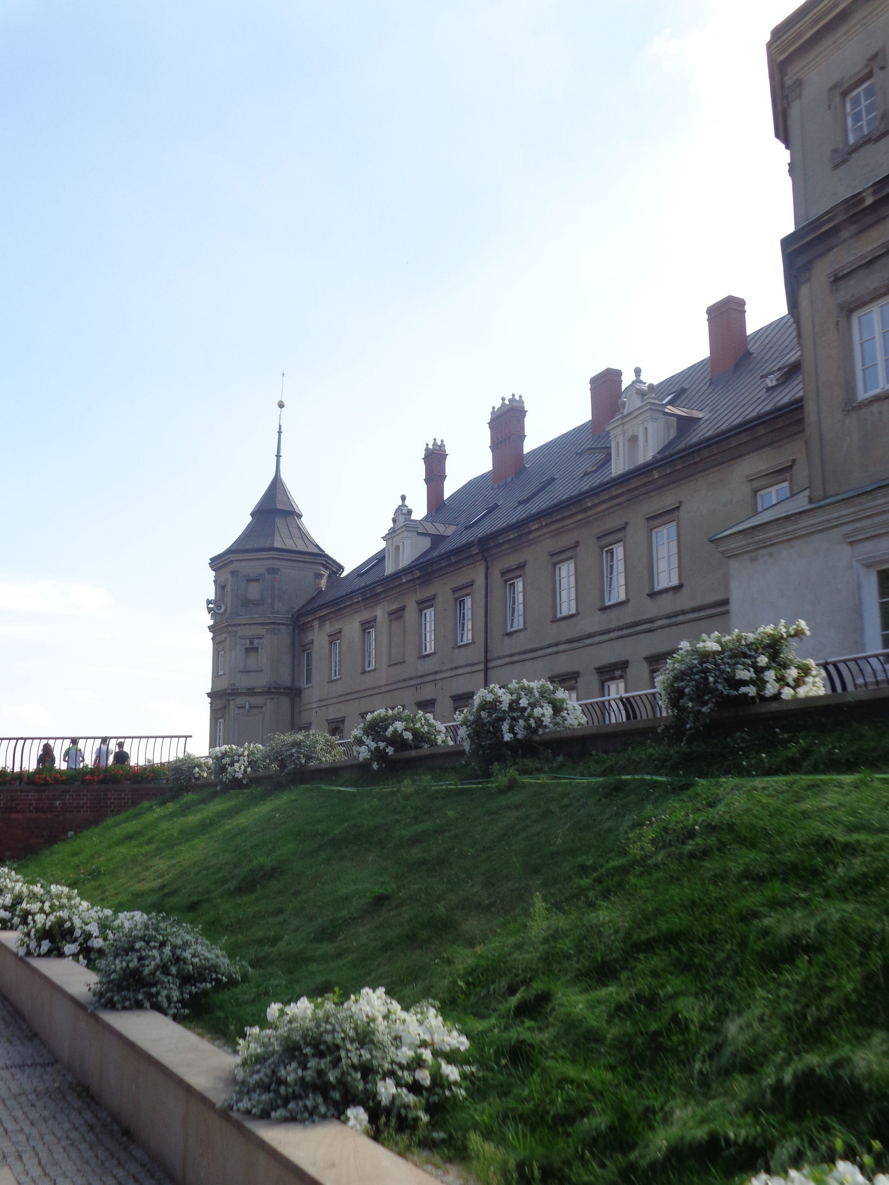 Częstochowa, klasztor, 1633-1650, XVIII